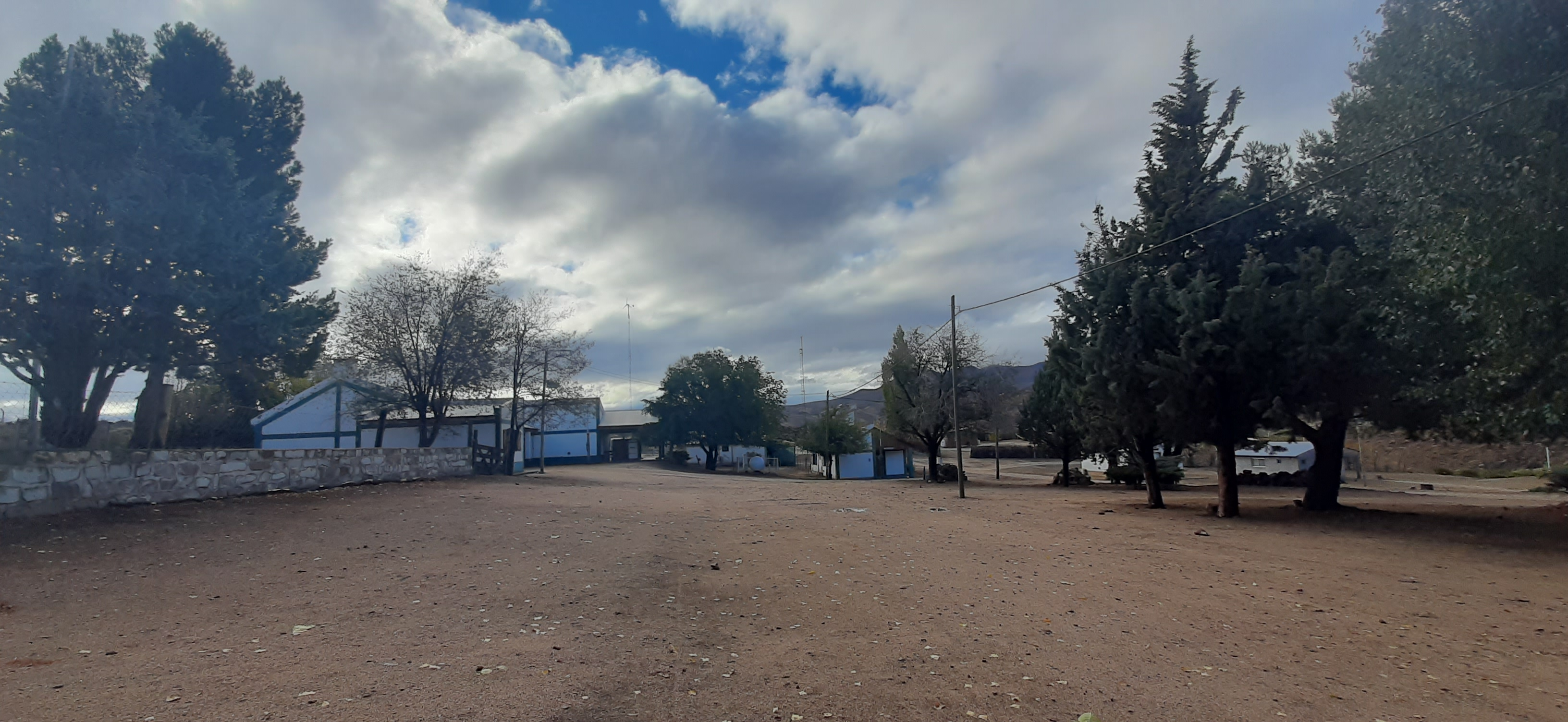 El paraje Pilquiniyeu del Limay relocalizado luego de la creación de la Represa Hidroeléctrica de Piedra del Águila